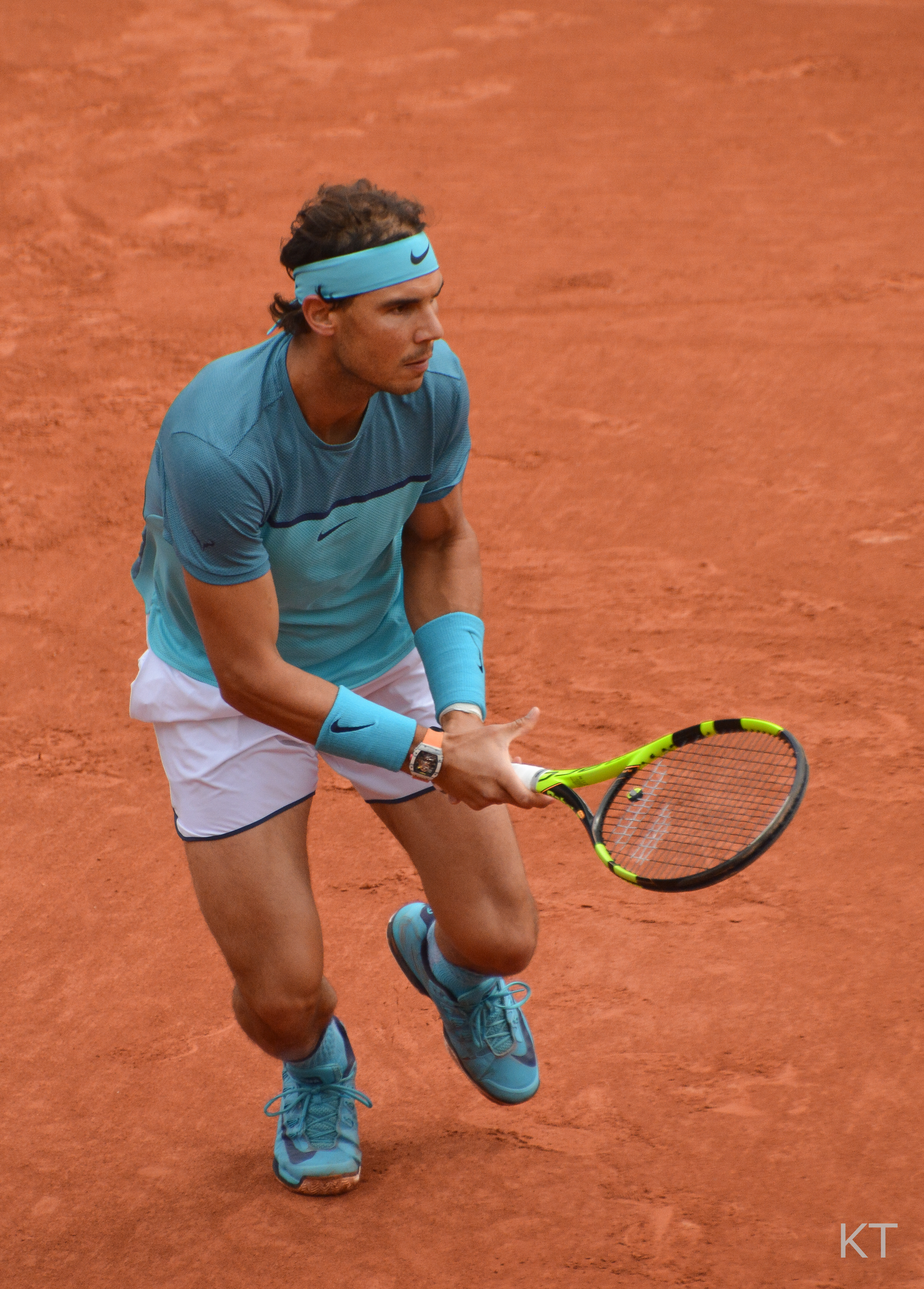 Roland Garros 2016